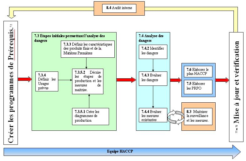 structure de la norme iso 22000